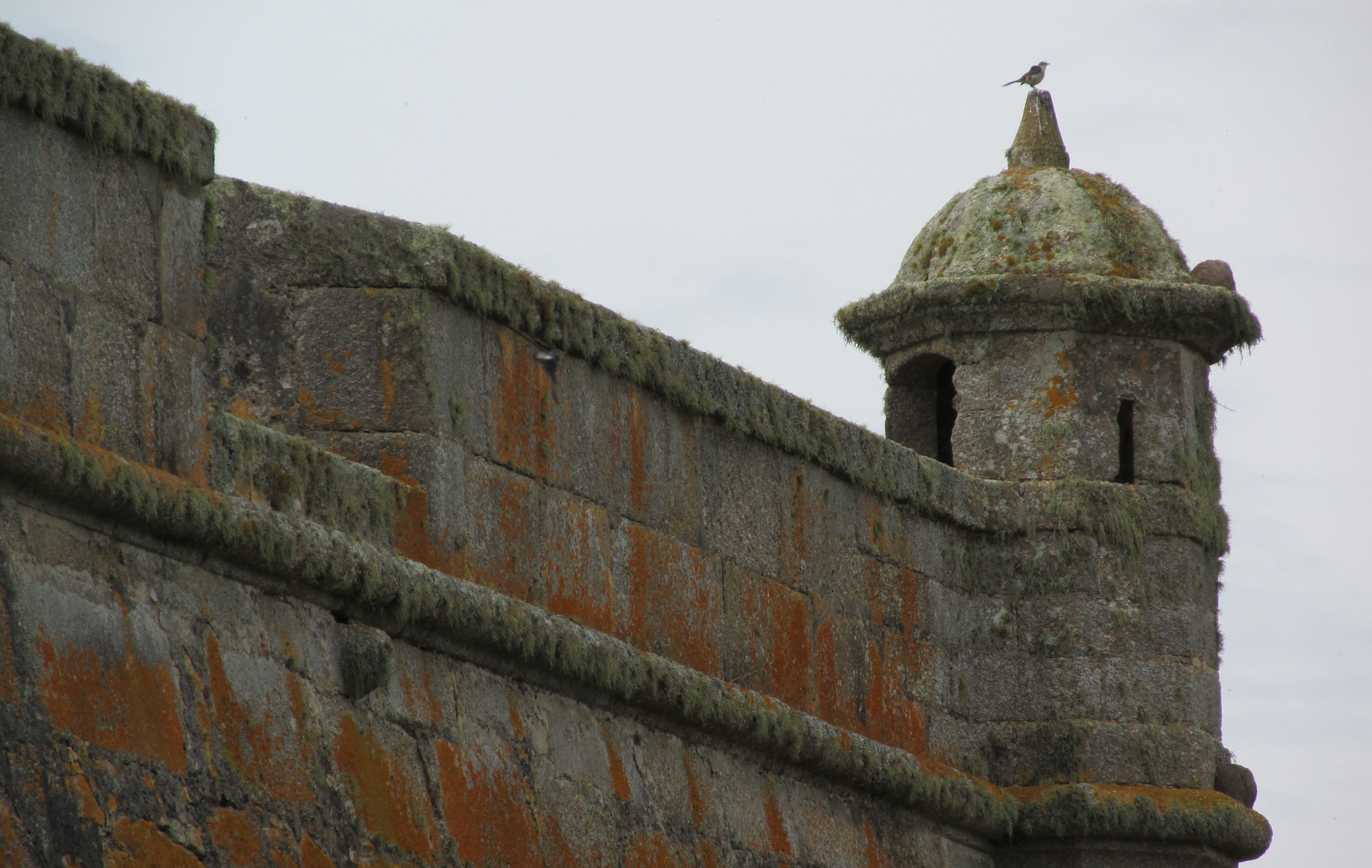 Fortaleza de Santa Teresa. Ubicada en el departamento de Rocha